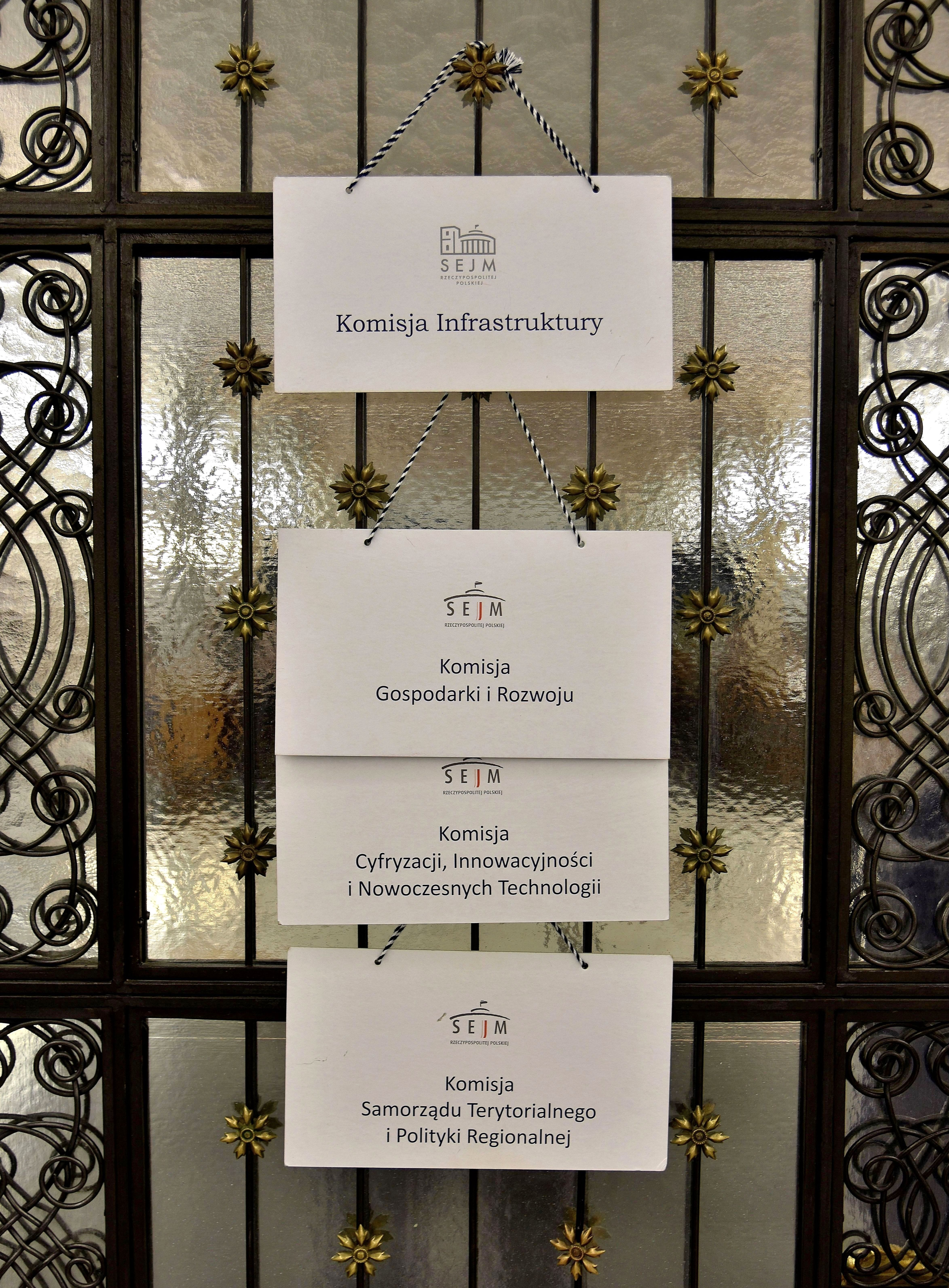 Tabliczki posiedzenia komisji sejmowych - Sala Kolumnowa